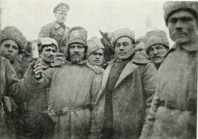 Солдаты Беломорского полка на фронте первой мировой. На коне прапорщик Пурин.